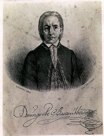 Retrato de Don Domingo de Basavilbaso de la Presa (1709-1775), político español. Fue el primer Administrador del Correo en Buenos Aires.